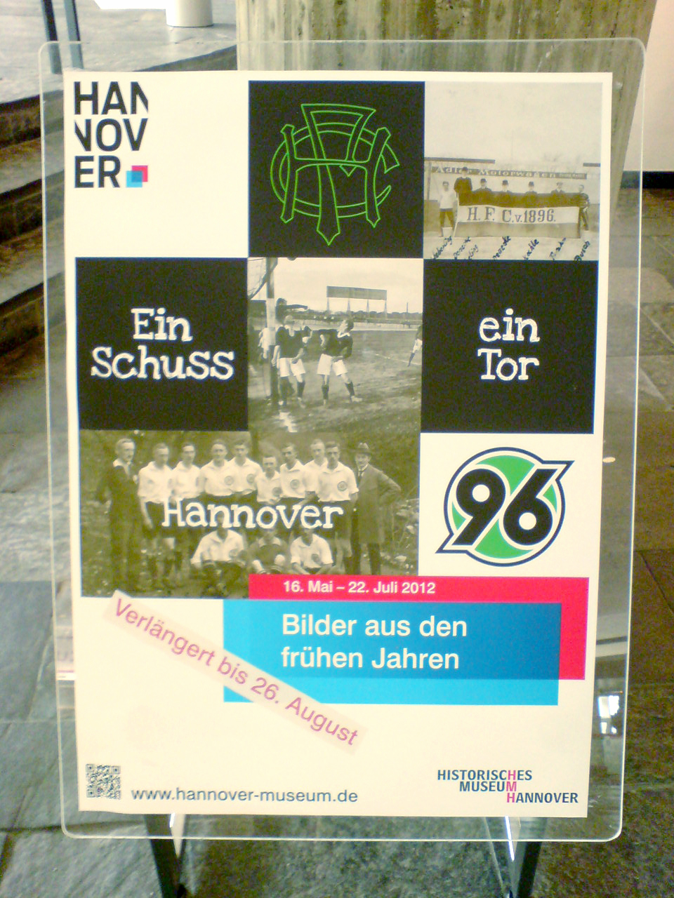 Verlängerung! Hier jedoch nicht im Fußball-Spiel, sondern der Ausstellung "Ein Schuss - ein Tor. Hannover 96-Bilder aus den frühen Jahren". Bis zum 26. August 2012 ...